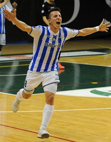 Maximiliano Rescia, giocatore di Calcio a 5, nel 2013 con la maglia dell'Acqua & Sapone futsal